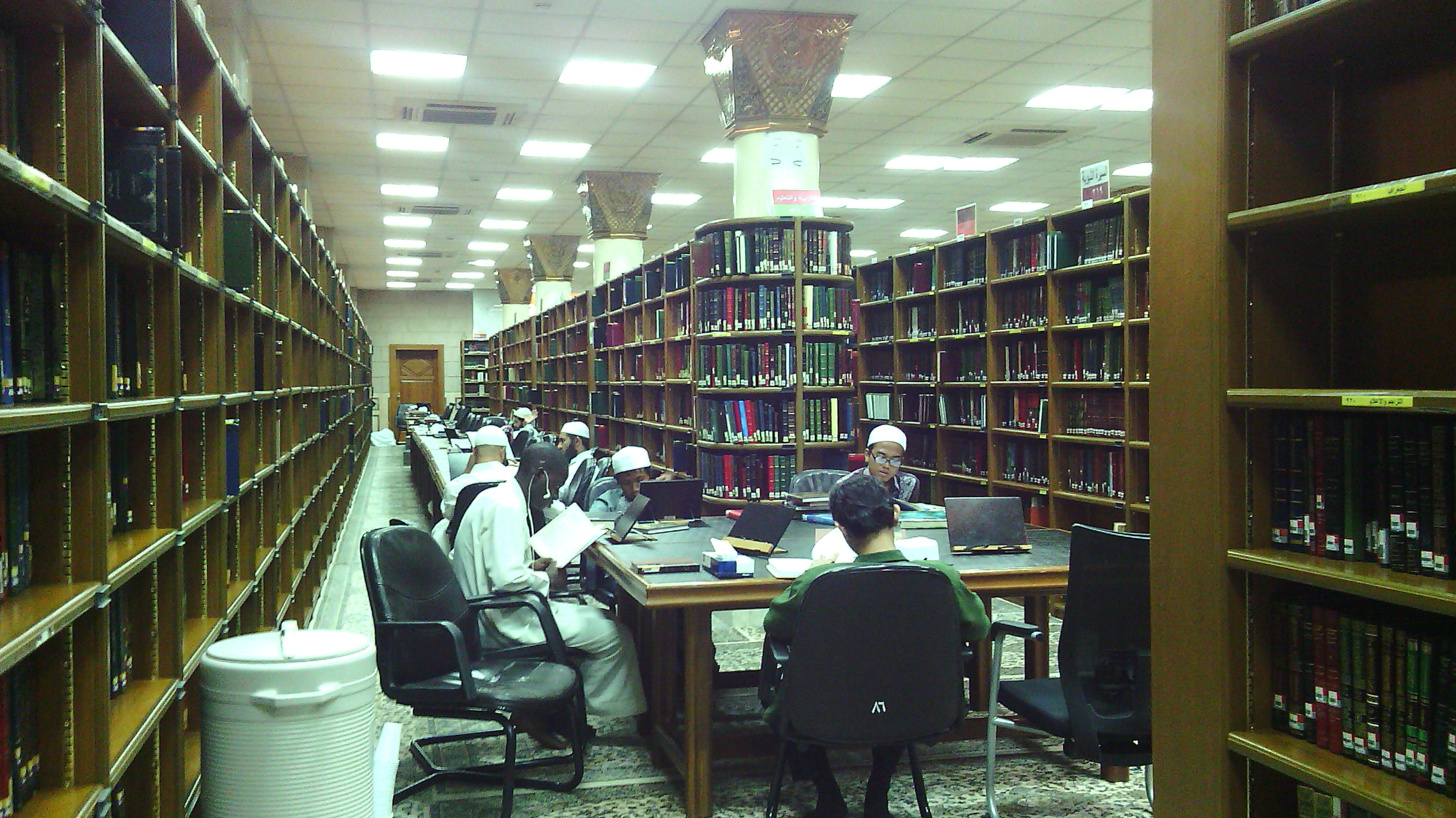 مكتبة المسجد النبوي الشريف